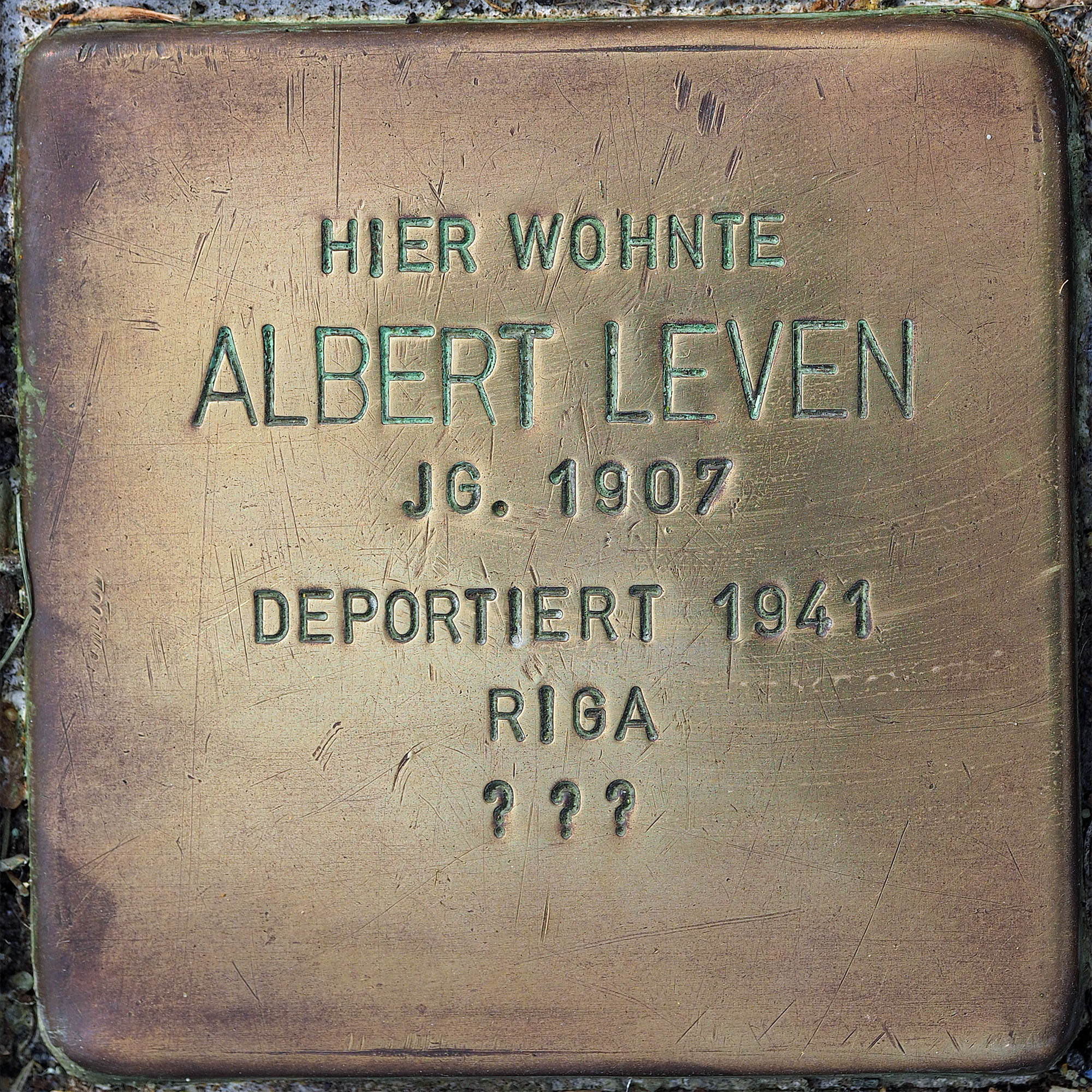 Stolpersteine MG: Leven, Albert